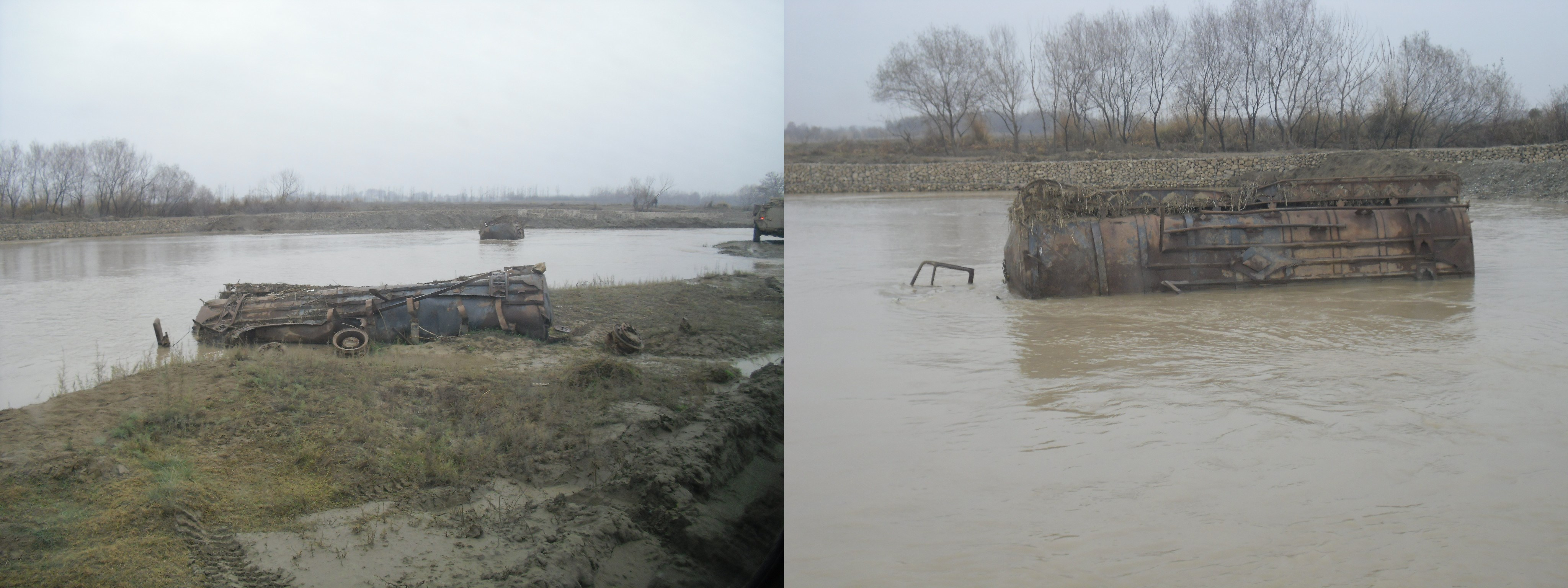 Wracks der beiden am 04.09.2009 zerstörten Tanklastwagen im Kunduz River. Die Tanklastwagen wurden durch einen Luftangriff zerstört.